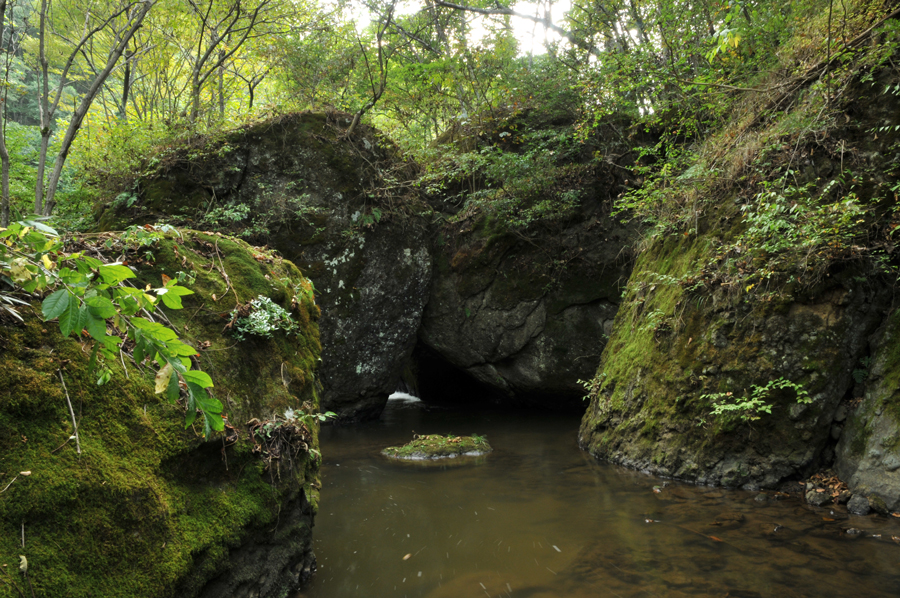 長野県上田市の鞍が淵